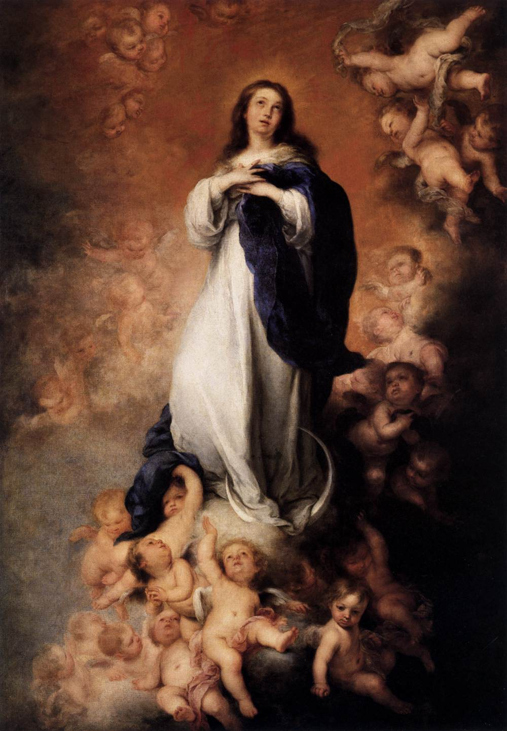 En la mayoría de las Inmaculadas de Bartolomé Esteban Murillo, de las que llegó a pintar unas veinticuatro, la Virgen María aparece vestida con una túnica blanca y un manto de color azul, con sus manos cruzadas sobre el pecho, y al mismo tiempo con una luna creciente a sus pies y con la vista puesta en el Cielo. Esta obra le fue encargada a Murillo por Justino de Neve (1625-1685), que era un canónigo de la catedral de Sevilla, con destino al Hospital de los Venerables de la ciudad de Sevilla, ya que en España se había extendido extraordinariamente desde el siglo XVI la devoción por la Inmaculada Concepción de María, siendo además dicho país el principal defensor del misterio y el que luchó con mayor insistencia hasta que se convirtió en uno de los dogmas de la Fe católica, aunque ello no ocurriría oficialmente hasta el año 1854. A lo largo de su vida, Murillo pintó unas dos docenas de Inmaculadas que en la actualidad se encuentran repartidas por todo el mundo, aunque cuatro de ellas se conservan en el Museo del Prado y otras tantas en el Museo de Bellas Artes de Sevilla, la ciudad natal del pintor.